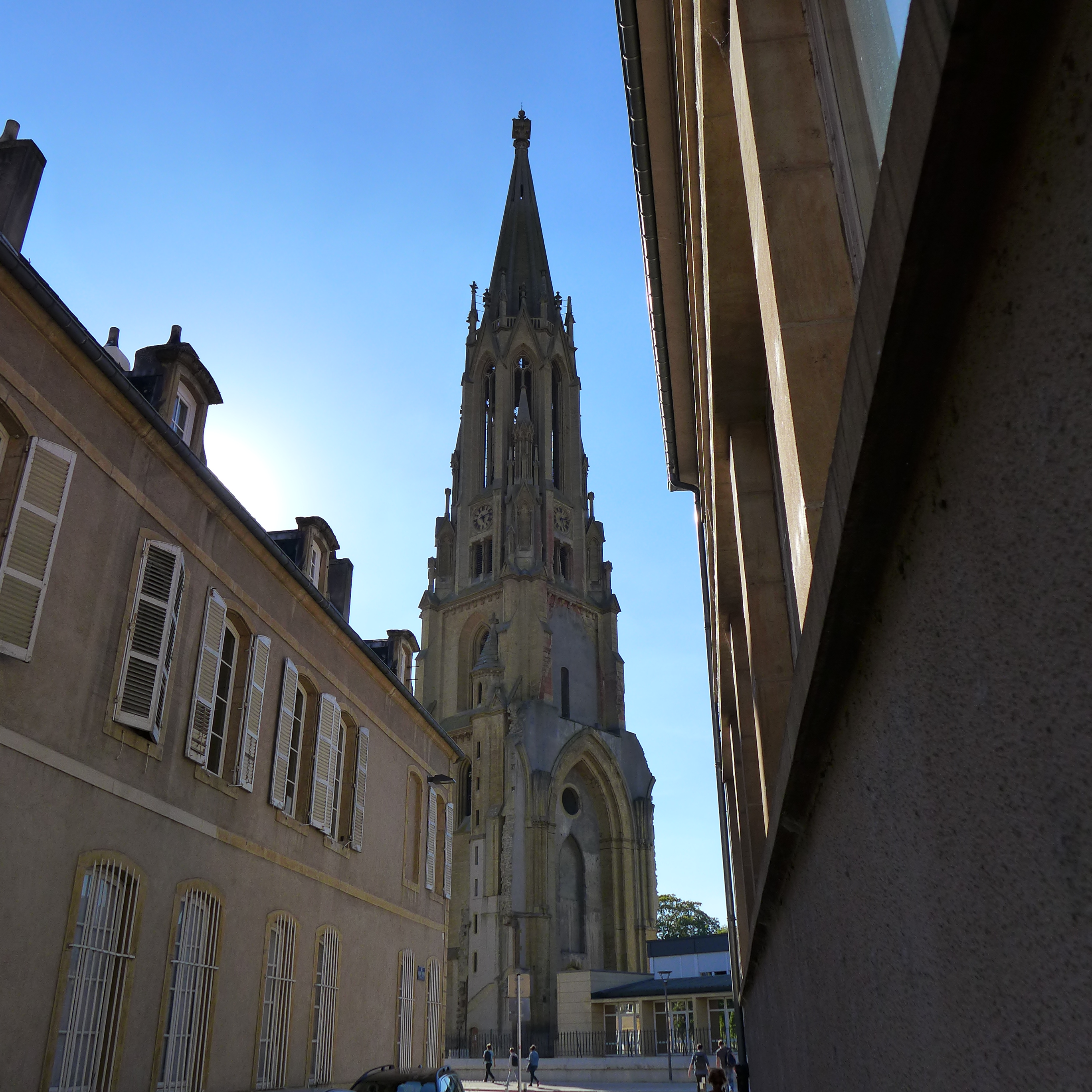 Garnisonskirche Metz, Turm